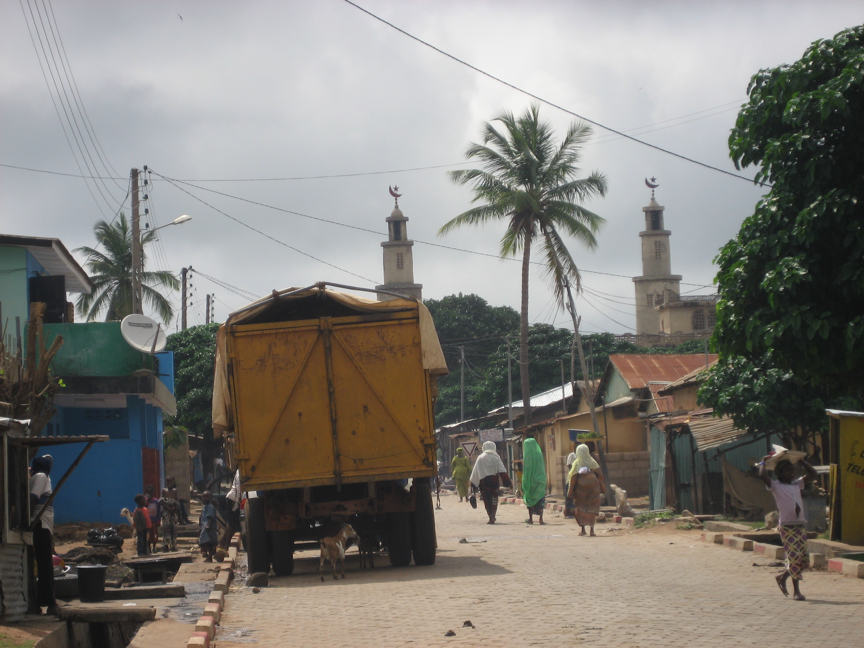 Parakou, Benin